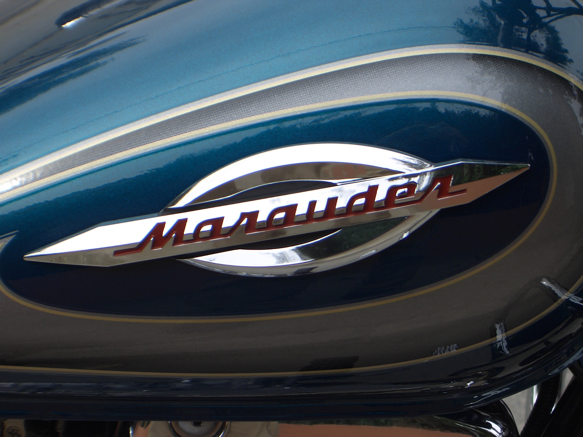 Tanque de combustible de una Suzuki GZ250 Marauder del año 2000. En la imagen se puede apreciar el logotipo clásico "Marauder".